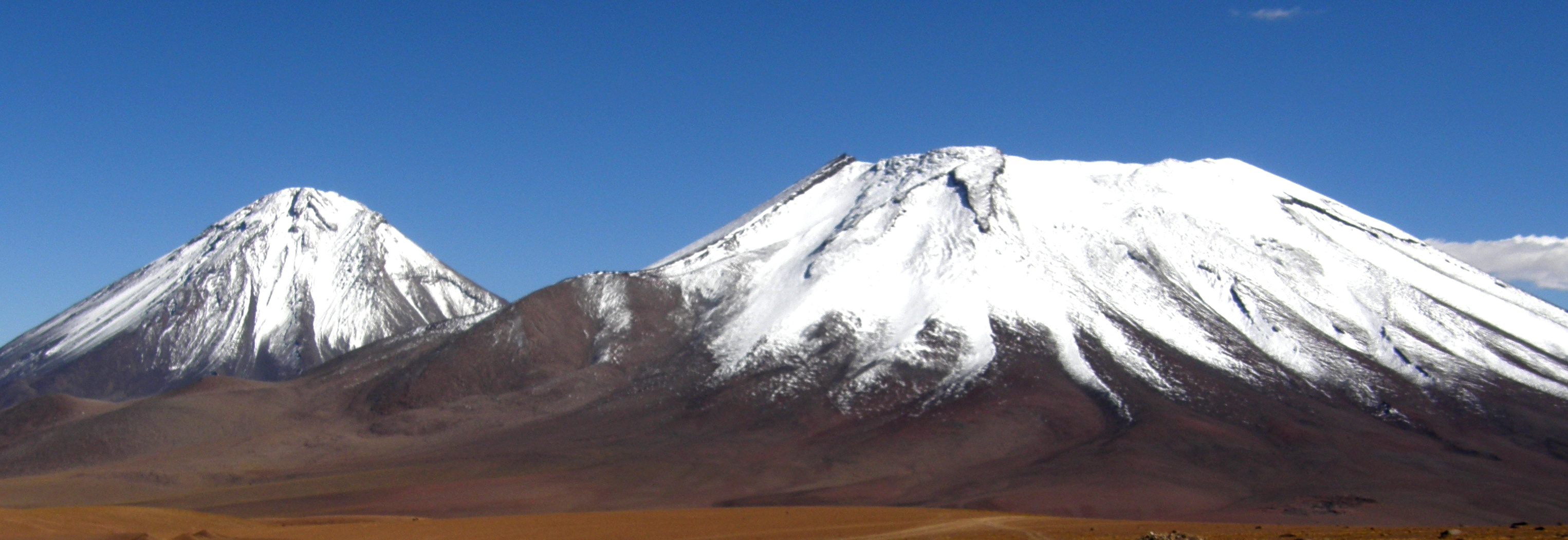 Pays : Chili, Région : Antofagasta, Province : El Loa, Au 1er plan le Cerro Juriques et derriere le Licancabur photo prise à partir de la route 27.